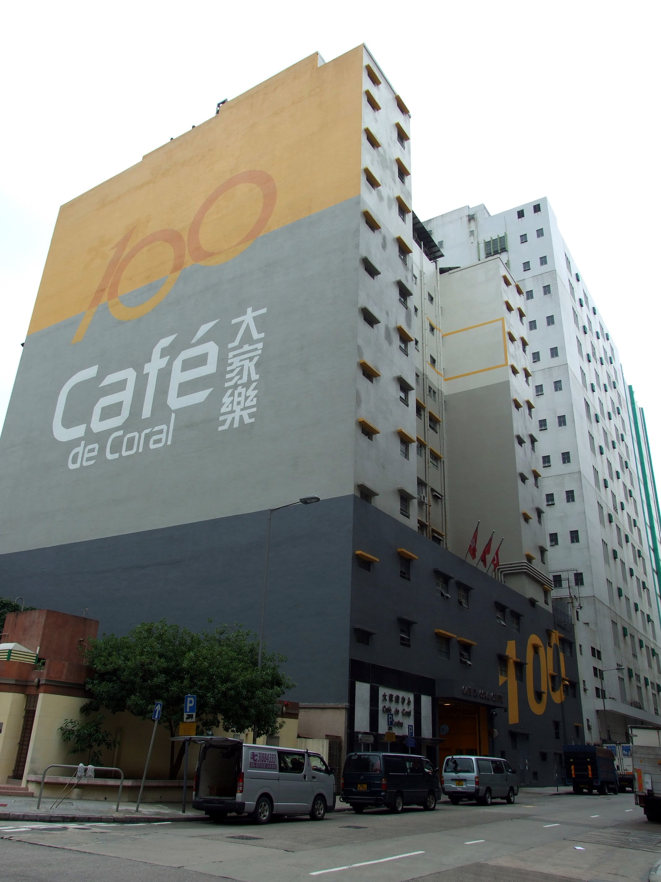 中文（香港）: 位於火炭的大家樂中心